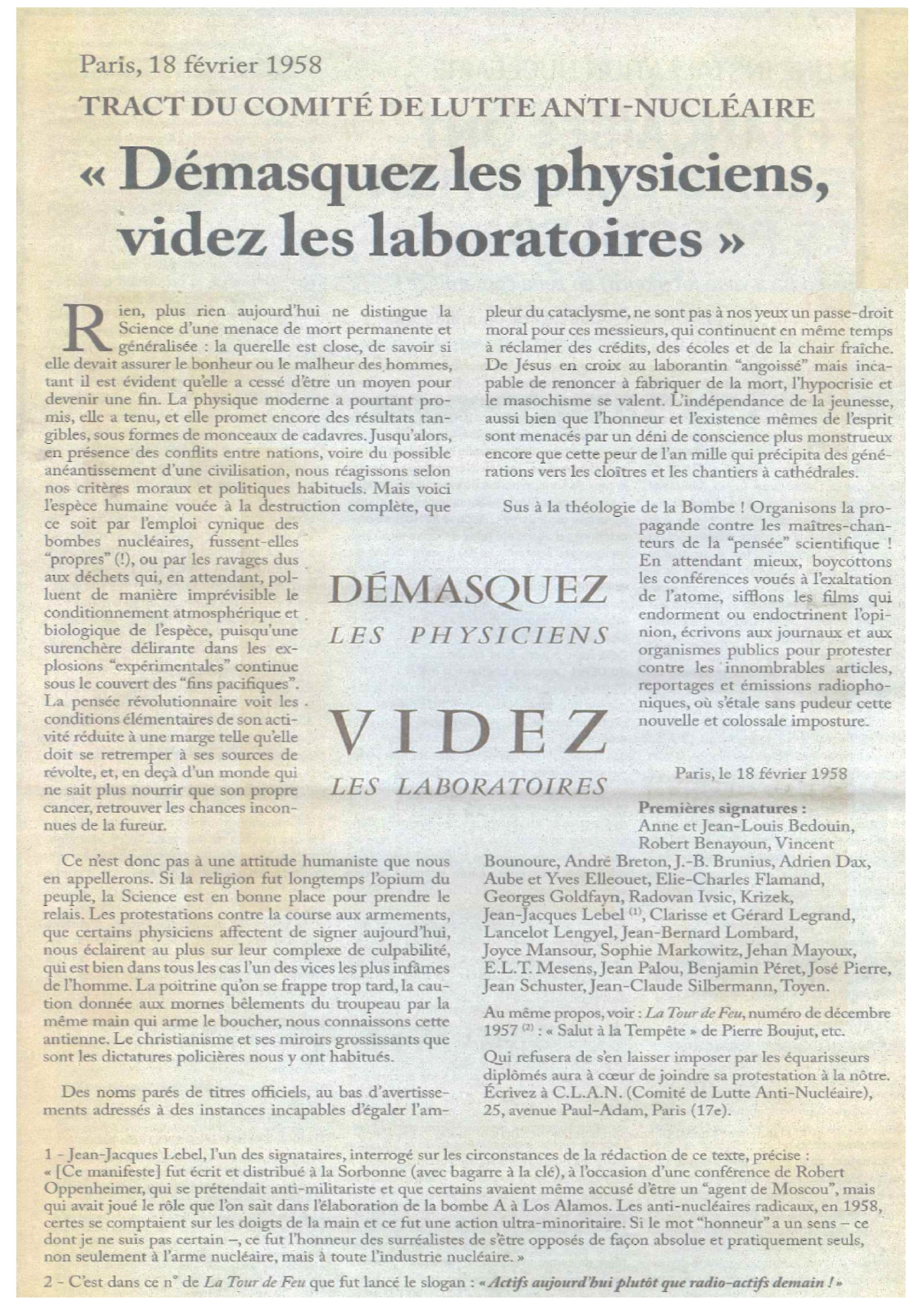 tract collectif surréaliste